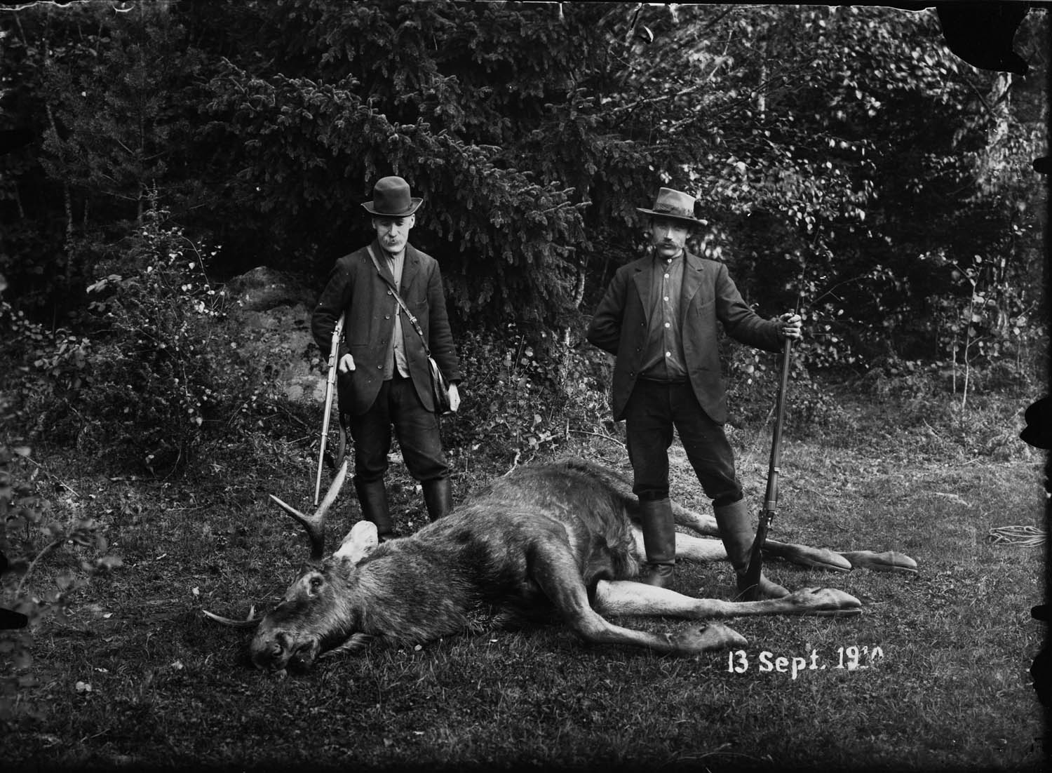 Älgjakt. Två jägare bredvid skjuten älg. Oppunda härad, Julita socken, Södermanland.